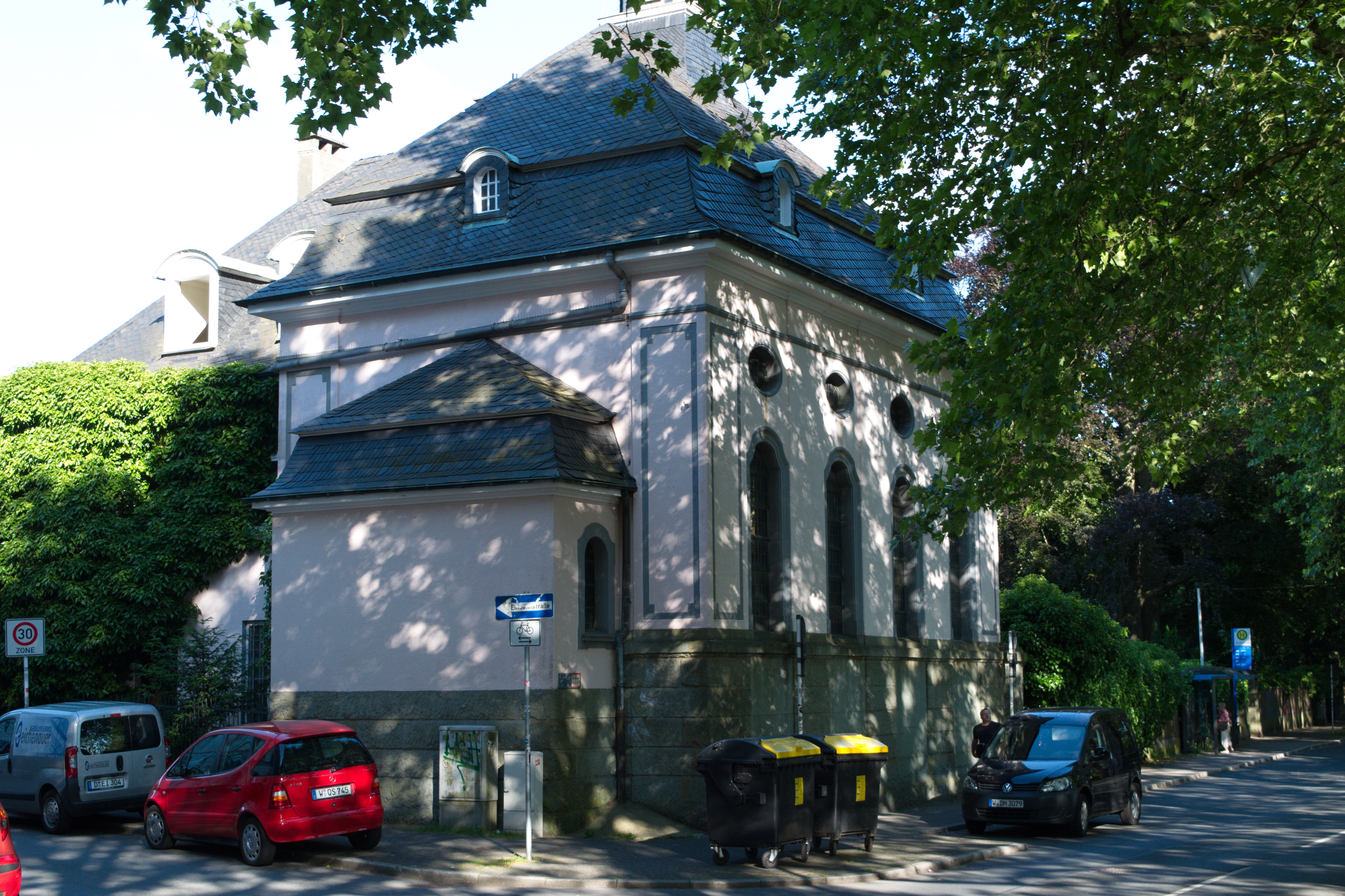 Hochstraße, Wuppertal